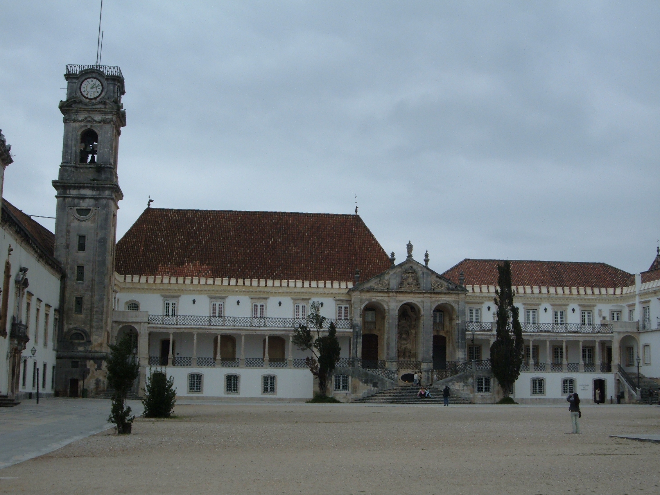 Facultad de Derecho de la Universidad de Coimbra